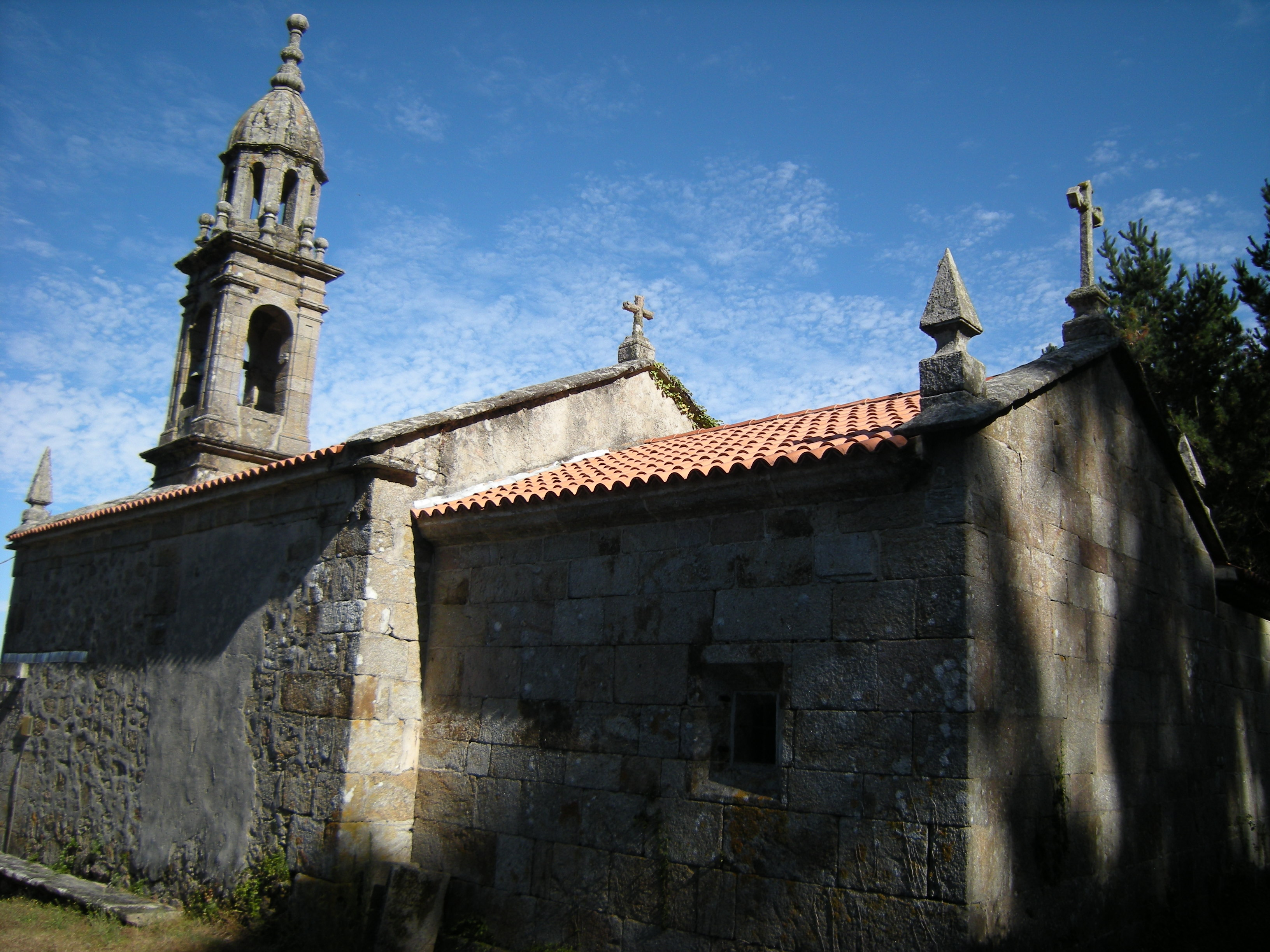 Iglesia de San Martiño de Touriñán